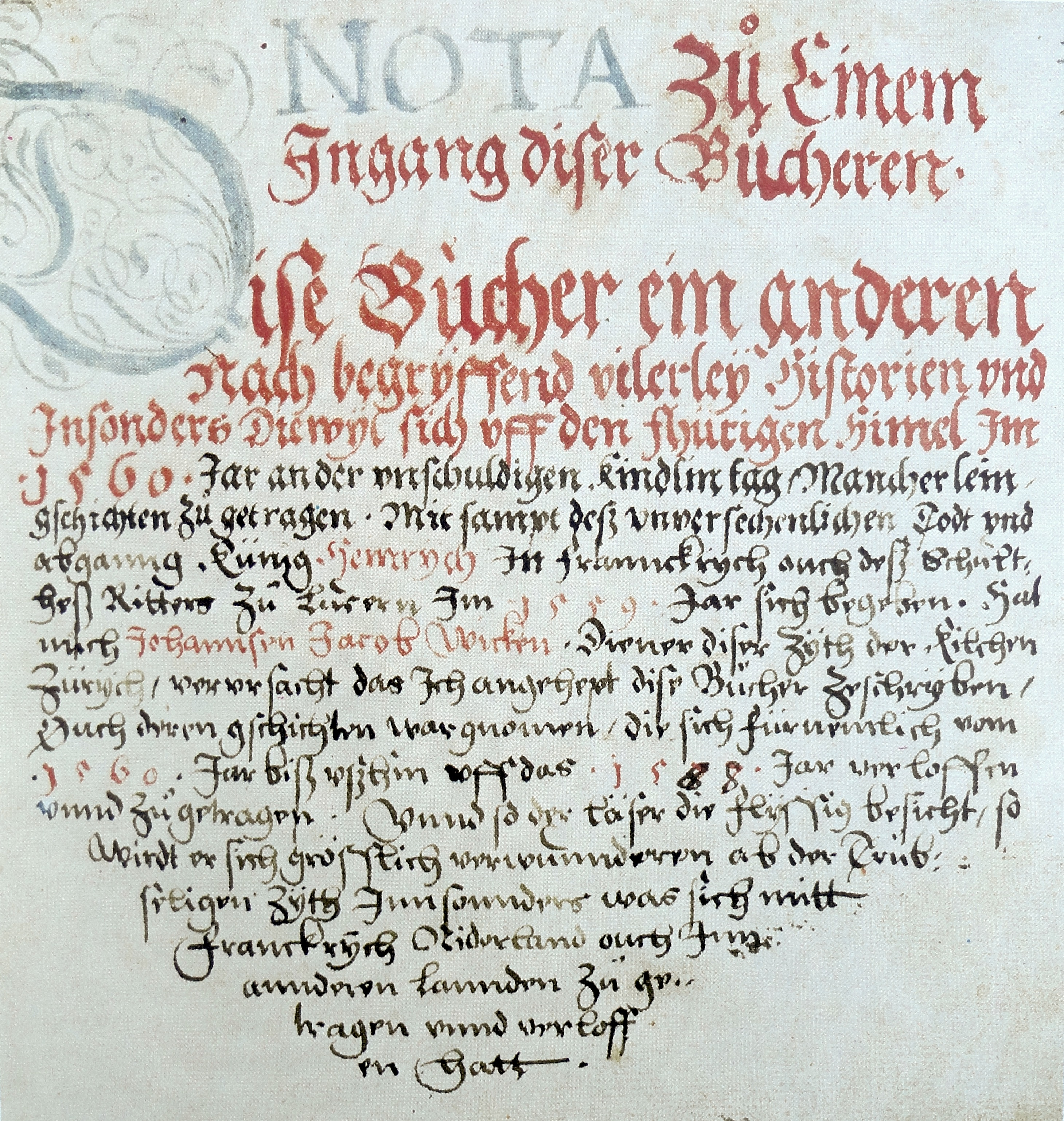 Wickiana